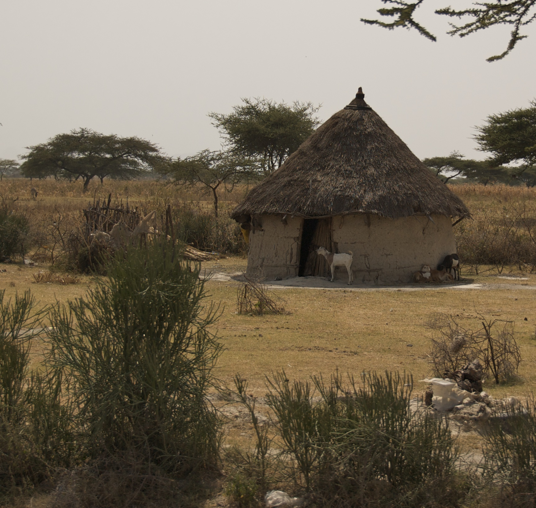 Ethiopia, 2007.